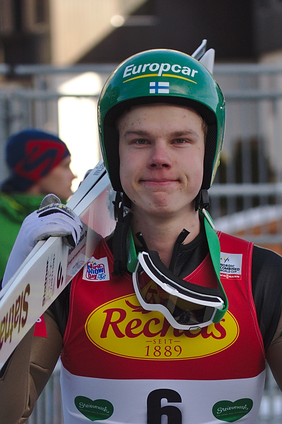 FIS Worldcup Nordic Combined Ramsau 2016. Bild zeigt Arttu Mäkiaho (FIN)